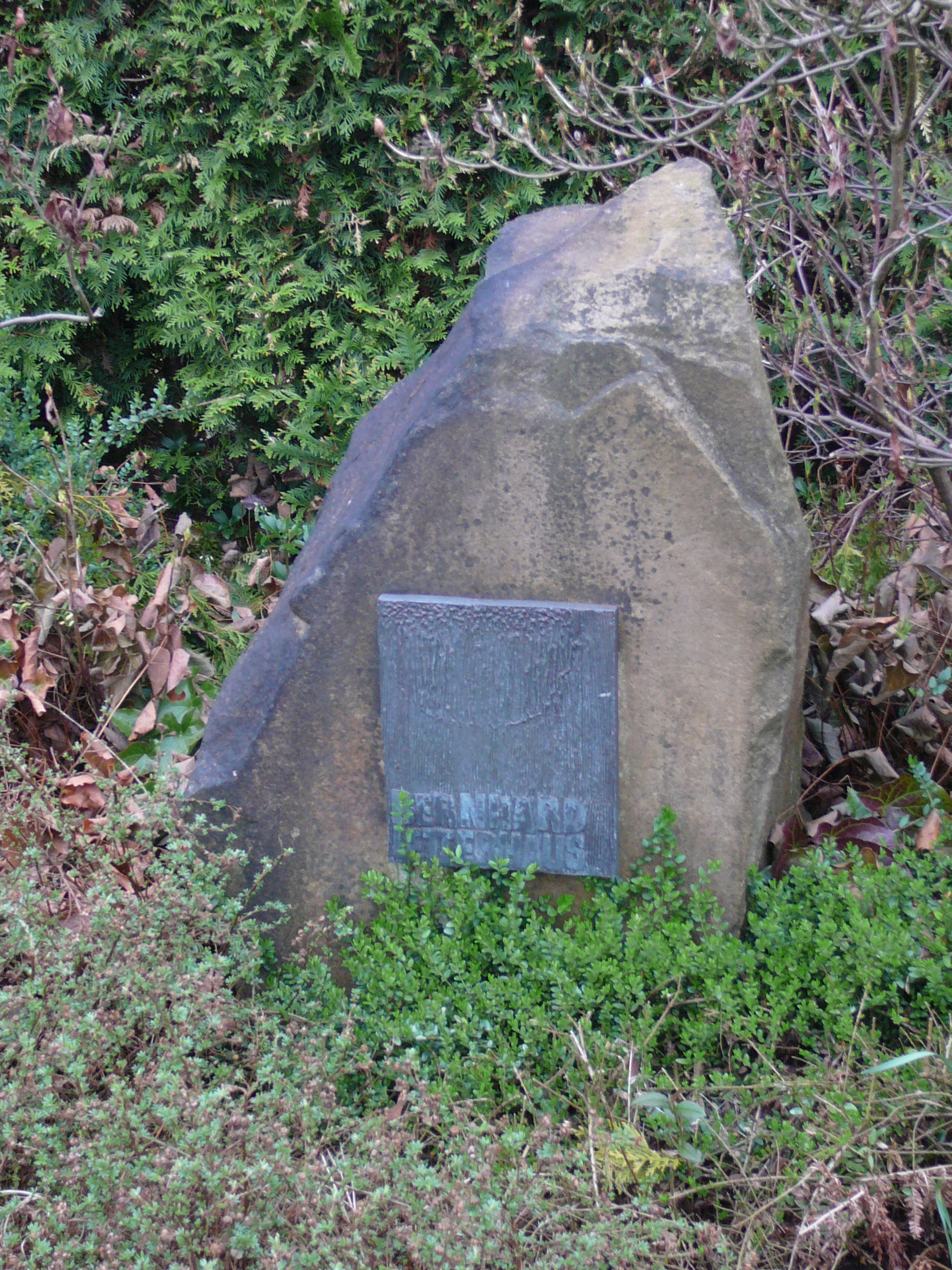 Konrad-Adenauer-Straße, Wuppertal